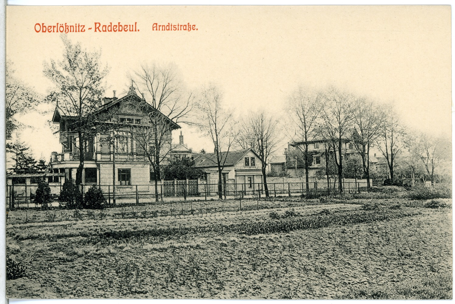 Radebeul; Arndtstraße in Oberlößnitz This postcard is from publisher Brück & Sohn in Meißen ( postcard has a unique number 14015 and is available in a higher resolution at the publisher. This images was uploaded in a cooperation project between Wikipedians and the publisher.